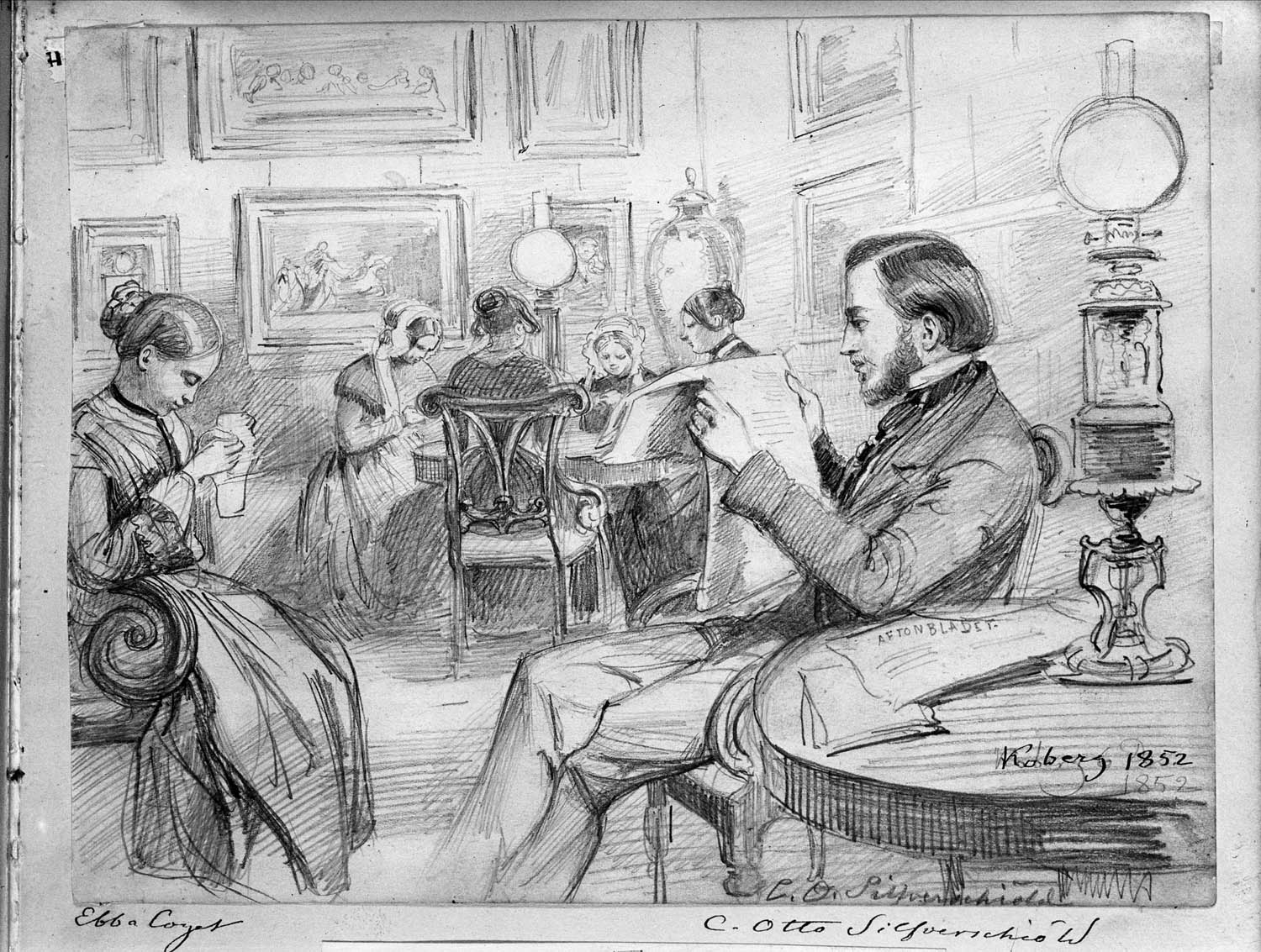 Salongsinteriör från Kobergs slott, Lagmansereds socken, Bjärke härad i Västergötland. Kvinnor och en man sitter i små grupper, kvinnorna handarbetar och mannen läser tidningen, på bordet ligger Aftonbladet. Fotogenlamporna är tända och på väggarna hänger målningar. Blyertsteckning (24x18.4 cm.) av Fritz von Dardel (1817-1901), daterad 1852.